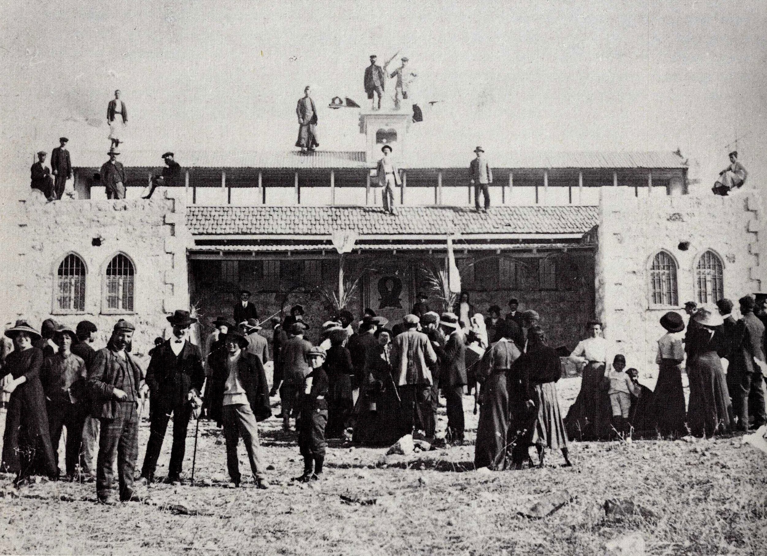 חנוכת מושבת בצלאל בבן שמן. חנוכה 1911. תצלום מאוסף מוזיאון ישראל.